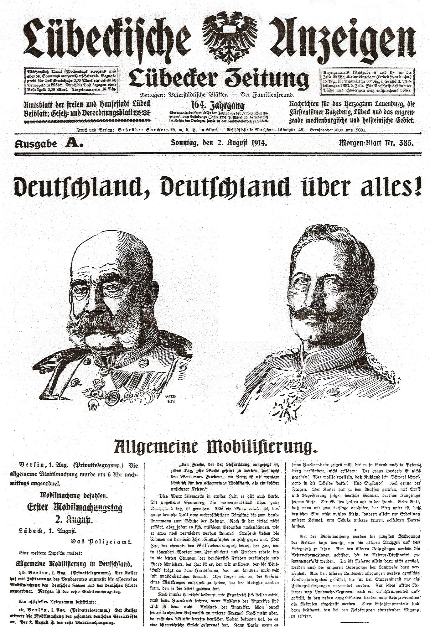 Lübeckische Anzeigen, Nr. 385, Ausgabe A vom 2. August 1914. Dieses Bild wurde in der Sendung Kulturzeit, in deren Beitrag: Geheimdienste und ihre Kulturen, gelaufen u. a. auf 3sat, 06. November 2015, verwendet. Ebenso wurde das Bild in der am 30. Juni 2018 auf arte gelaufenen Sendung Mythos Einstein - Leben und Werk eines Rebellen (44:03) im Bezug auf den Kriegsausbruch verwendet.